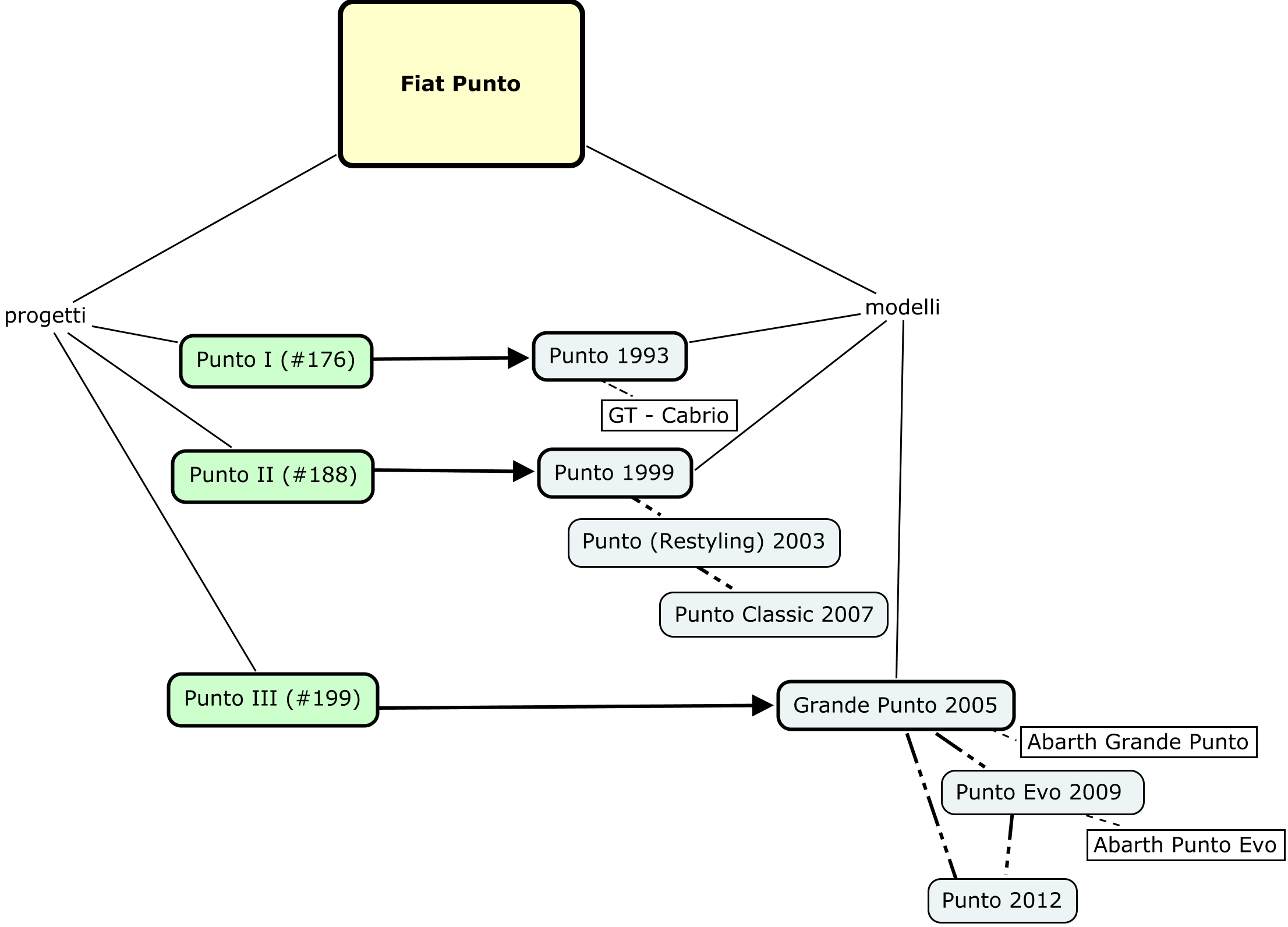 Mappa che mostra i vari modelli della Famiglia Punto: a sinistra i nomi/numeri identificativi di progetto, a destra i nomi commerciali dei modelli. Legenda: verde: progetti azzurro: modelli freccia: modello direttamente derivato dal progetto puntolinea: restyling o modelli derivati dal modello principale punteggiato fitto: versioni derivate dal modello principale (linea continua: semplici collegamenti grafici)